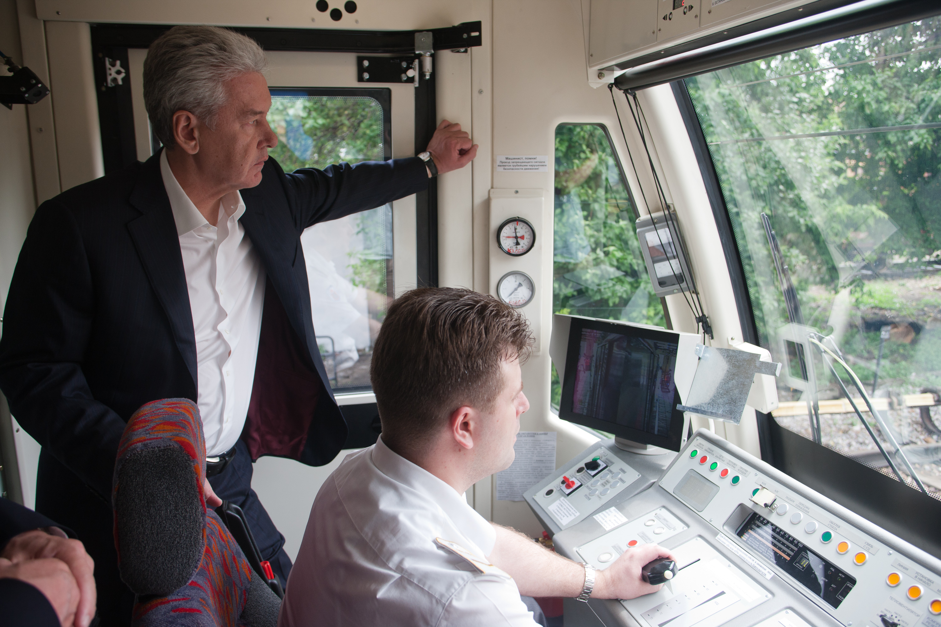 Сергей Собянин в кабине метропоезда 81-740 Русич. Электродепо Красная Пресня Московского метро